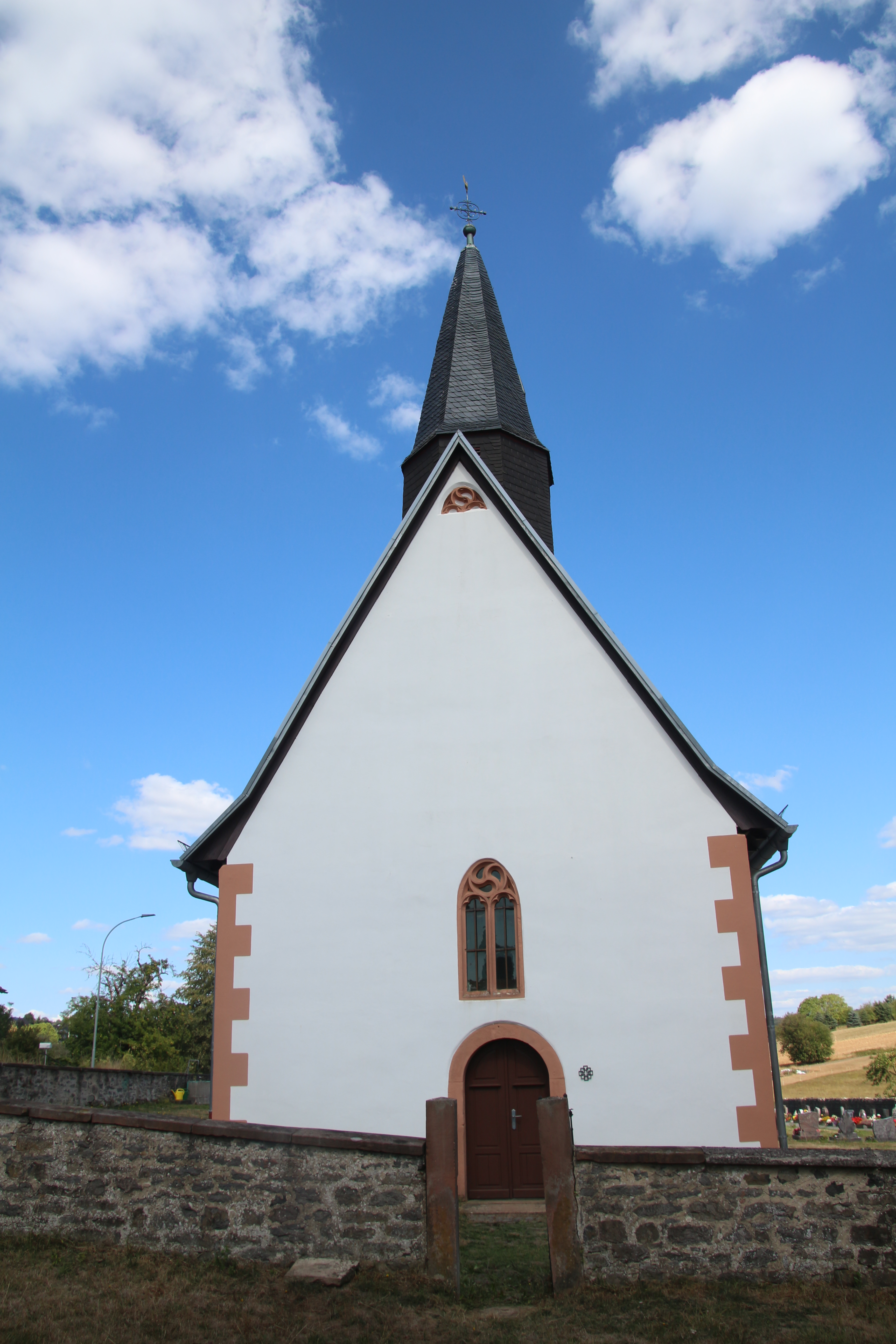 Evangelische Kirche Unter-Lais, Gemeinde Nidda, Wetteraukreis, Hessen